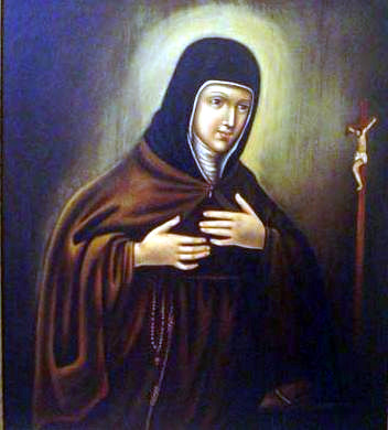 Santa Camilla Battista da Varano, religiosa, mistica ed umanista italiana (1458) (1524)